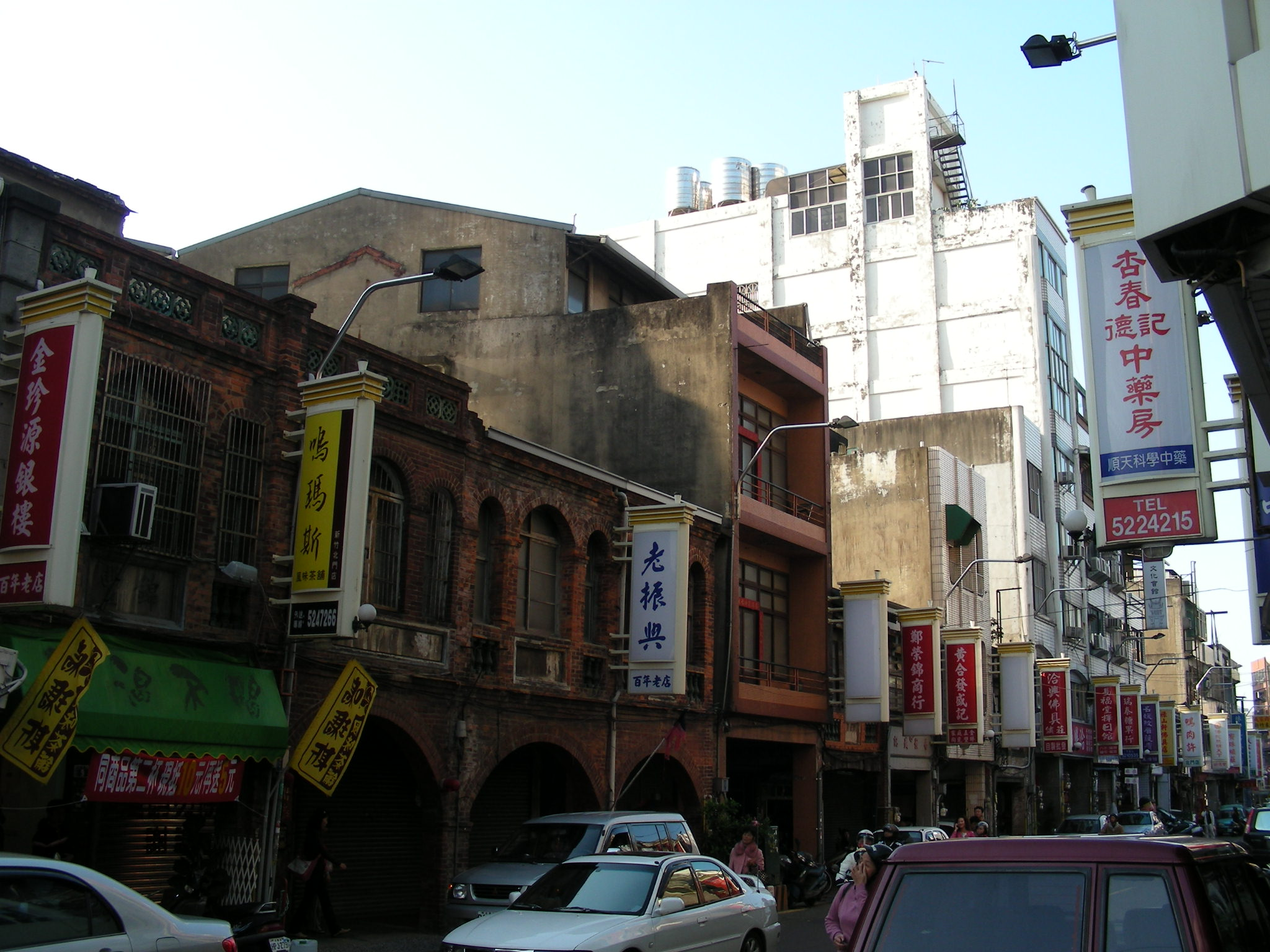 "Bei Men" Street in Hsinchu City, Taiwan